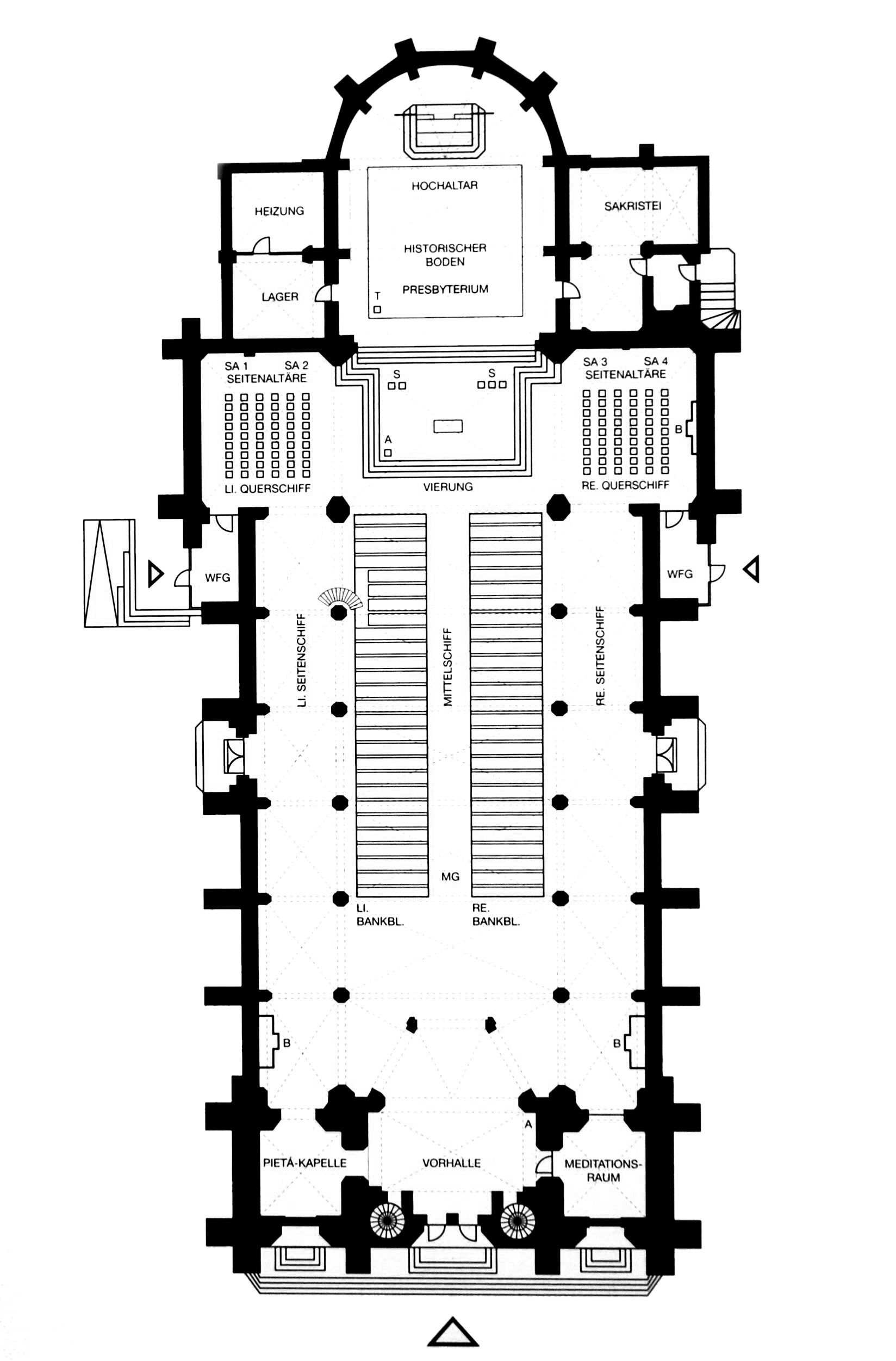 Herz-Jesu-Kirche in Bregenz. Architekt: Joseph Cades Baujahre 1905/08, Baumeister: Kornel Rhomberg aus Bregenz sowie Paul Faulhaber aus Rottweil.